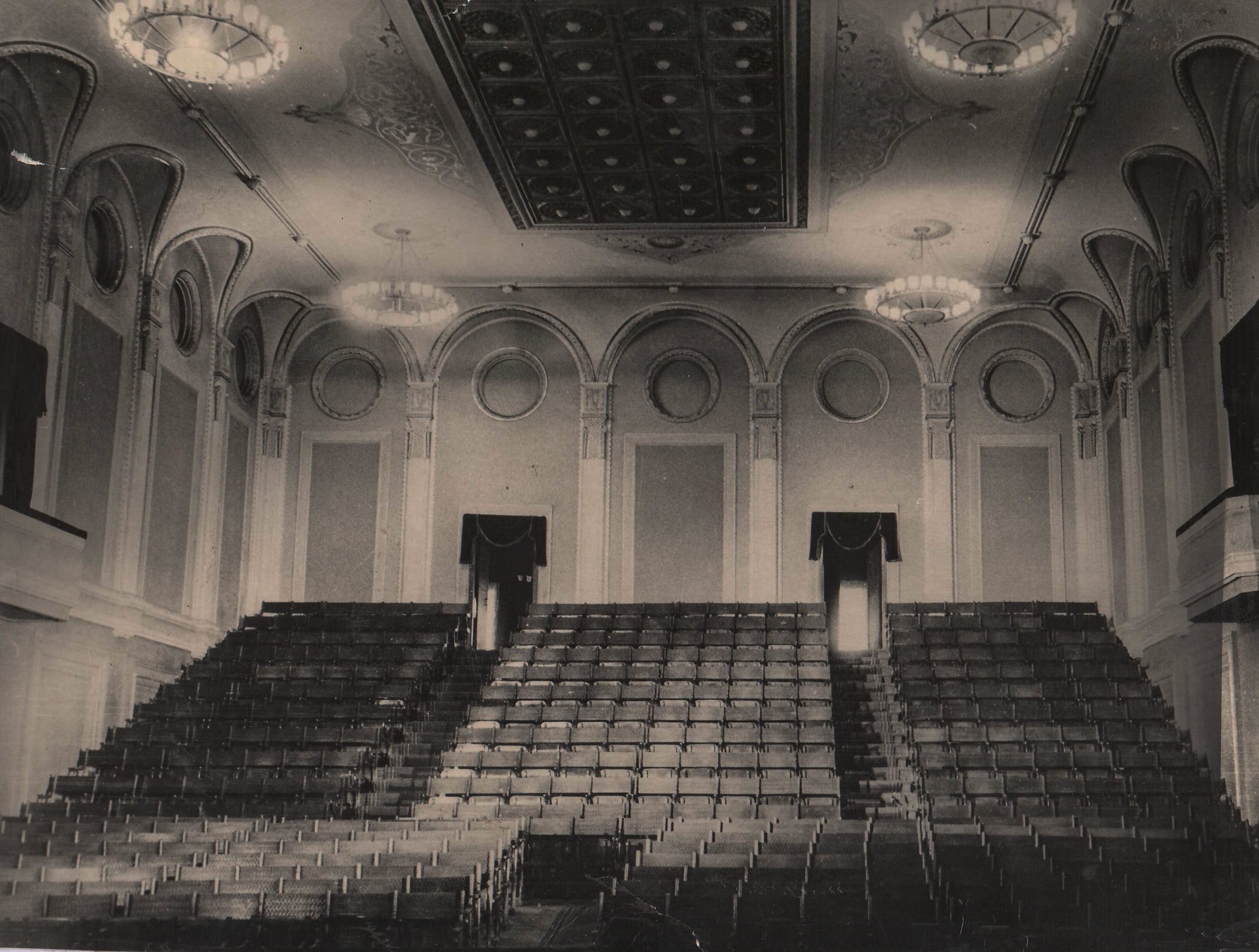 ერისთავის თეატრის დიდი დარბაზი 1947 წელი